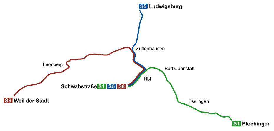 S-Bahn-Netz Stuttgart, Stand 1978